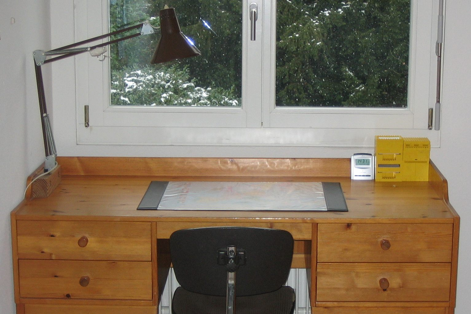 Beschreibung: Ein aufgeräumter Schreibtisch Quelle: selbst geschossen Datum: 12. Feb. 2006 Autor: Sämi.